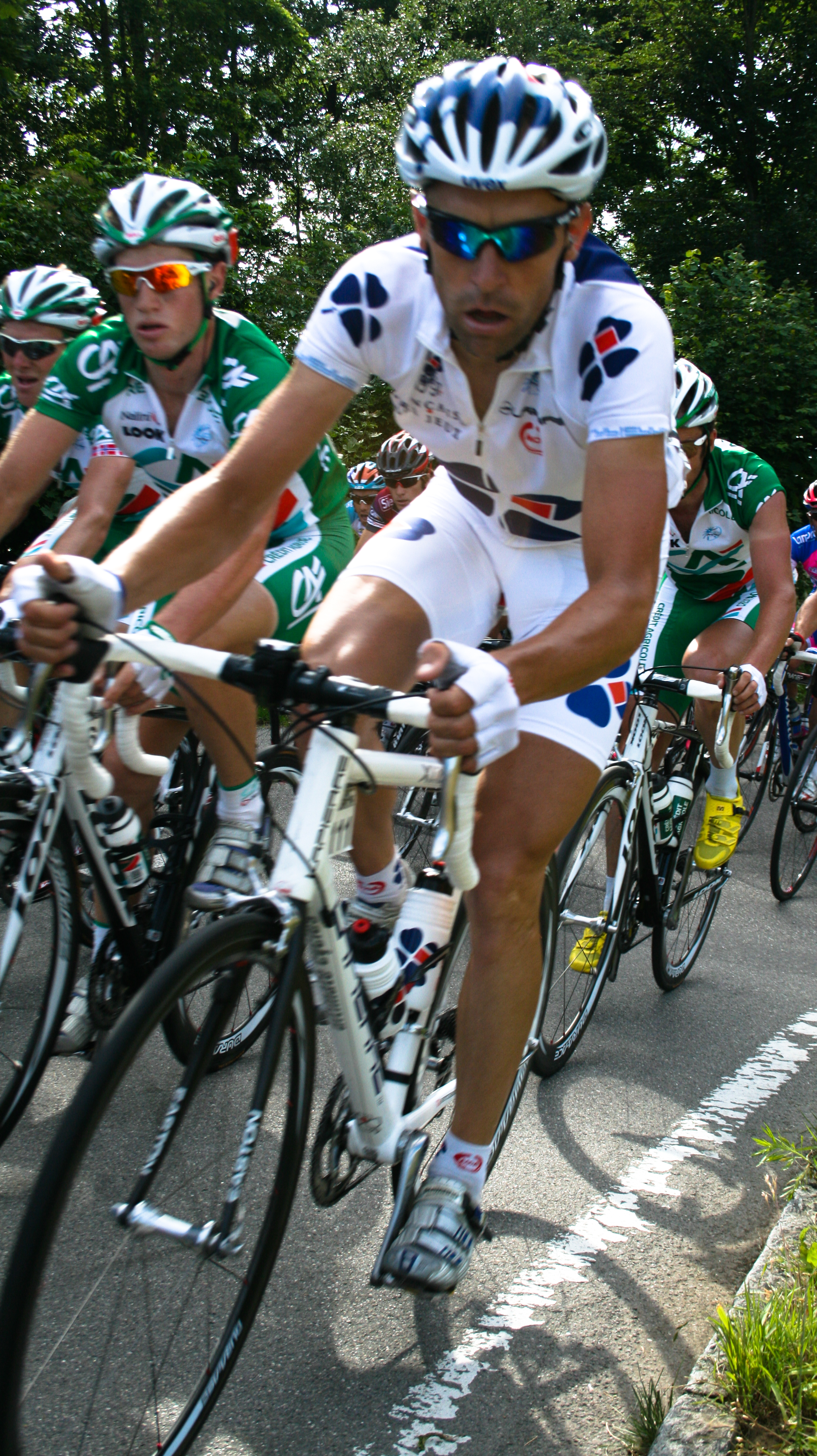 Frédéric Guesdon lors de la 7 ème étape du Tour de Suisse 2008